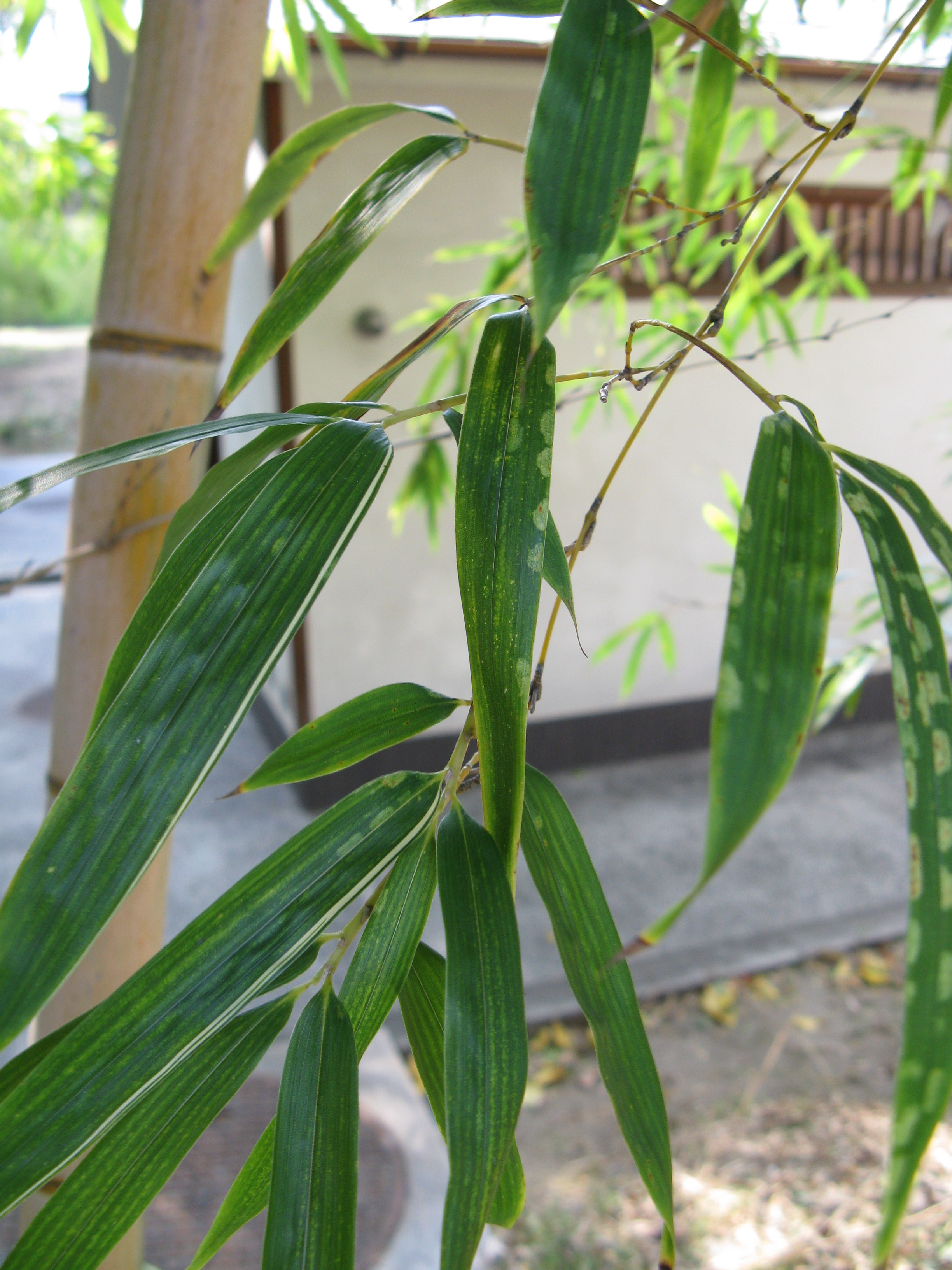 Phyllostachys heterocycla 'Tao Kiang'